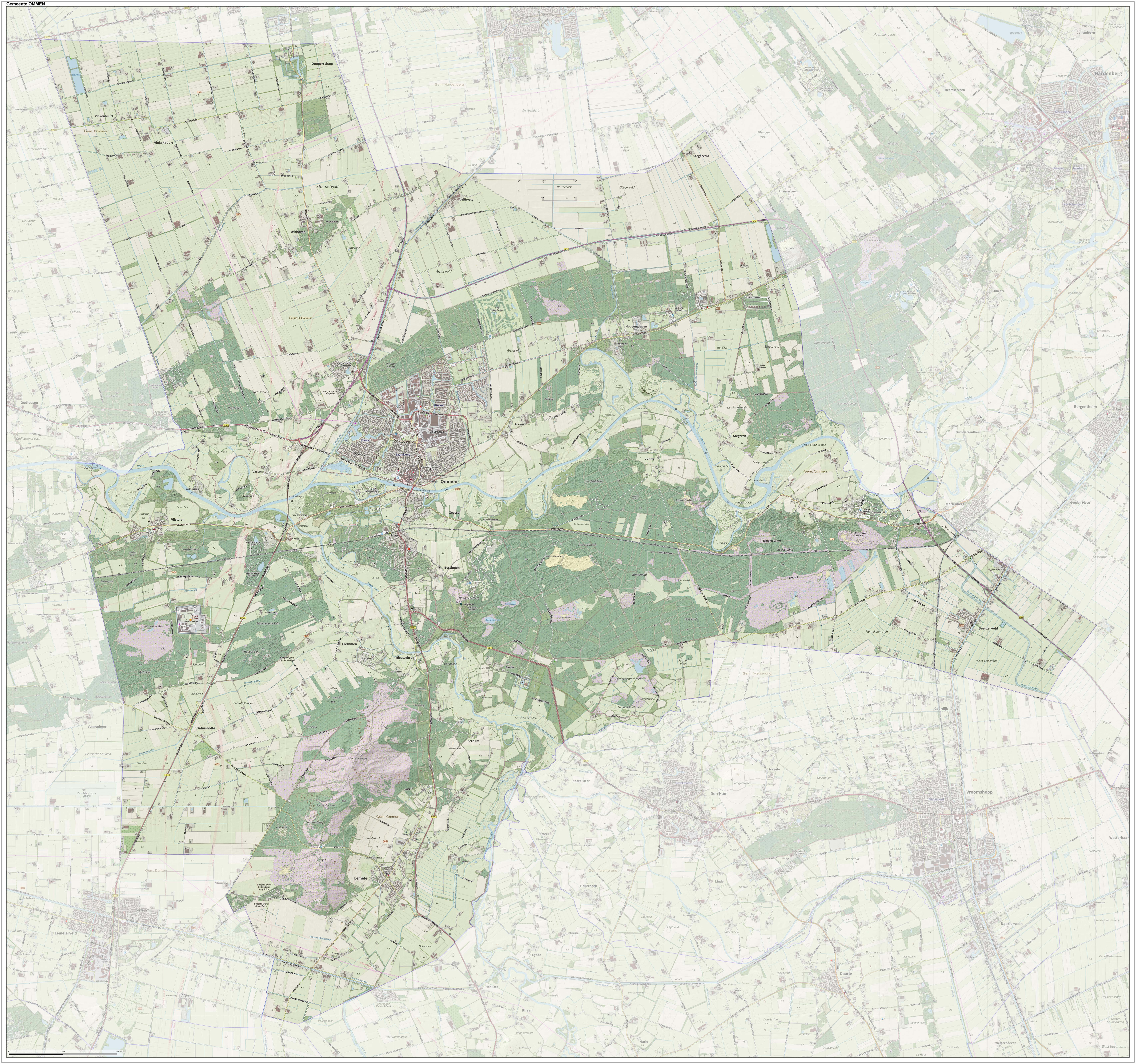 Topografische gemeentekaart. Resolutie: 400 pixels/km. Kaartbeeld samengesteld uit de open geodata van de Top10NL en Top25namen (Kadaster), Creative Commons-BY licentie. Gebouwvlakken uit open geodata BAG extract. Wegen uit de OpenStreetMap, OpenStreetMap community. Reliëfschaduw uit de Actuele Hoogtekaart AHN2. Samenstelling en kleurenschema: Jan-Willem van Aalst, met QGIS. Zie ook de Legenda.